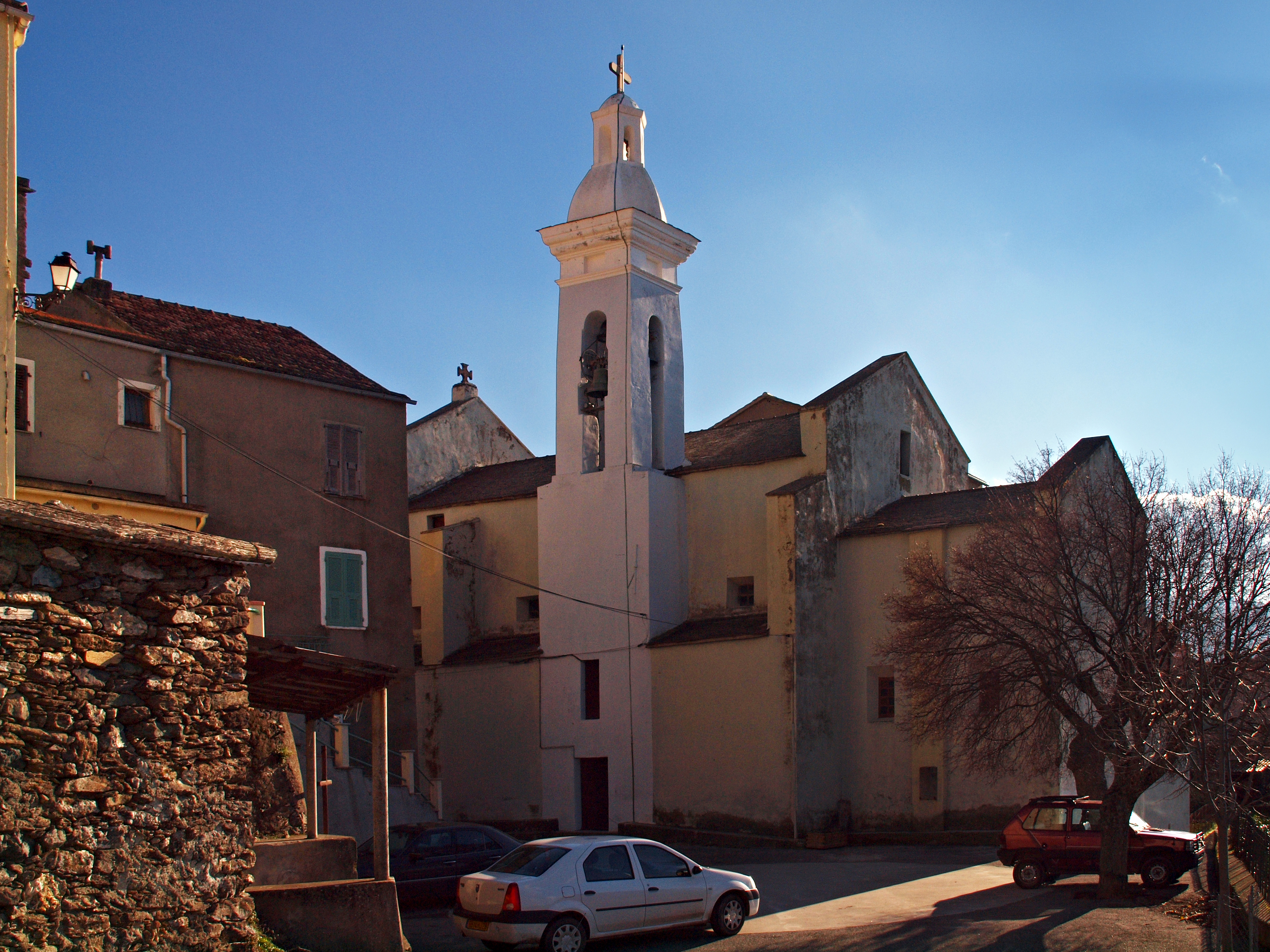 Altiani, Rogna (Corse) - Église paroissiale Sainte-Marie